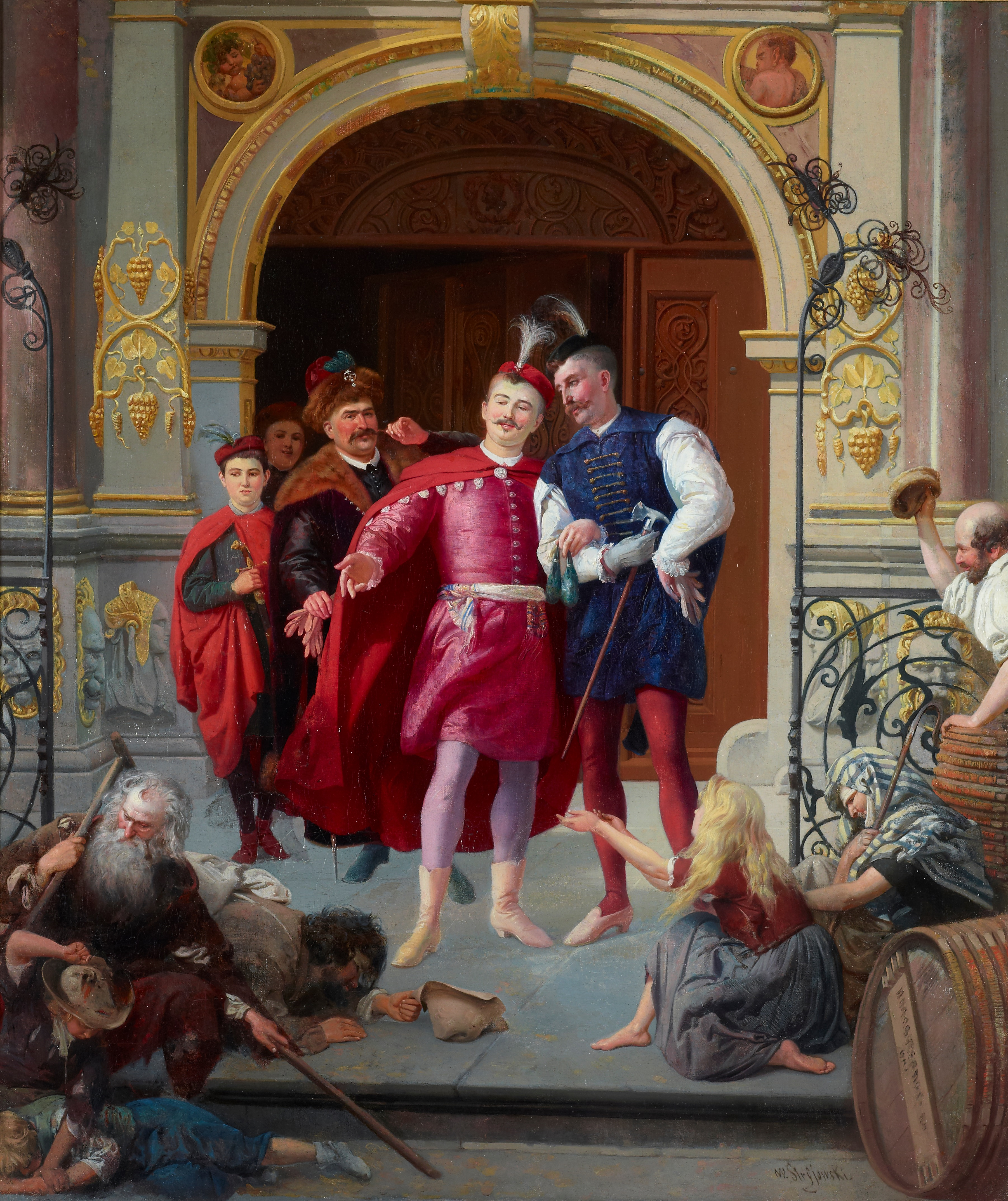 Polish szlachta in Gdańsk.